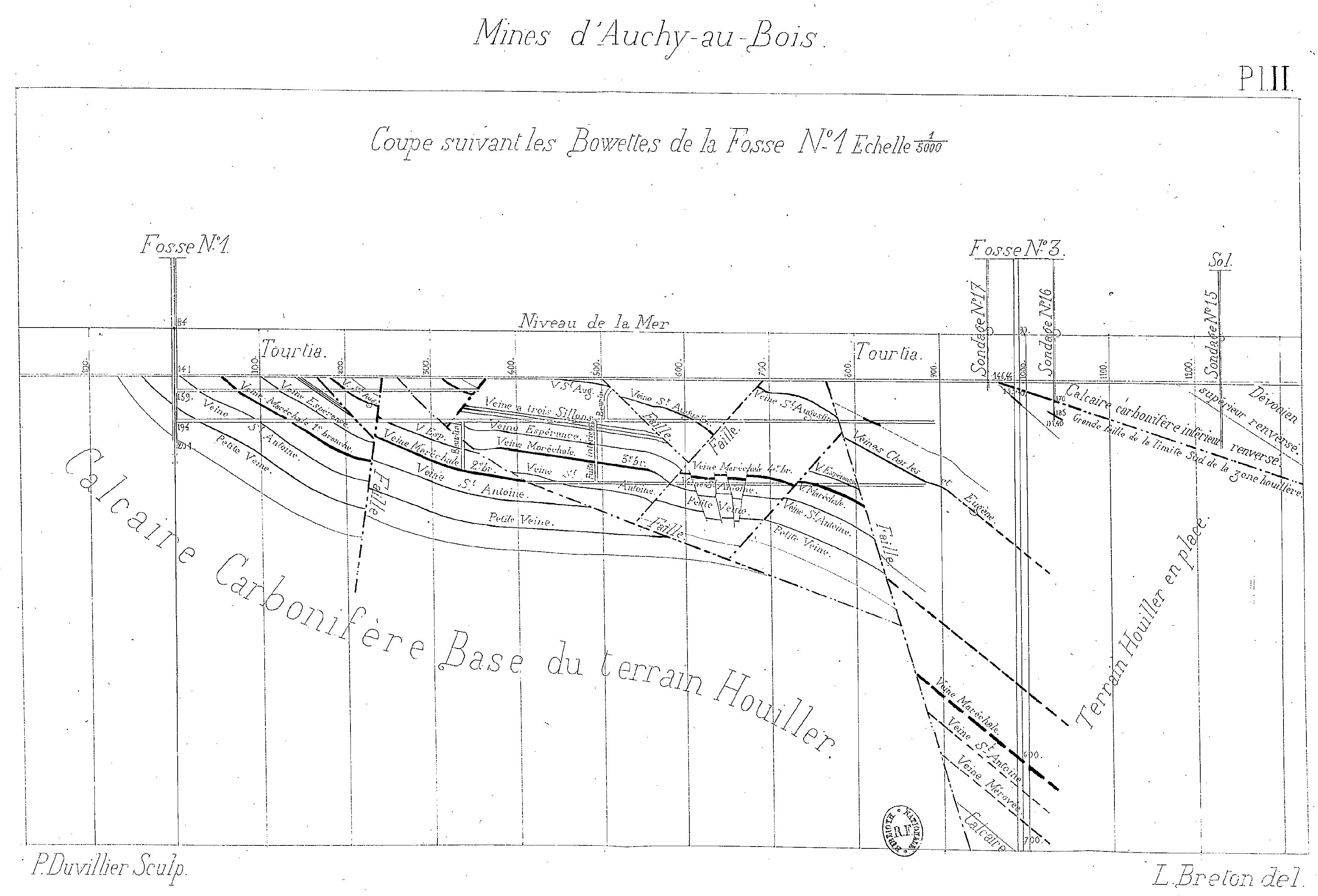 Compagnie des mines d'Auchy-au-Bois.